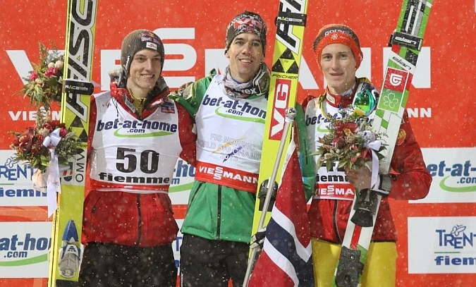 Gregor Schlierenzauer, Anders Bardal i Peter Prevc na podium konkursu indywidualnego mężczyzn na skoczni normalnej w ramach Mistrzostw Świata 2013.